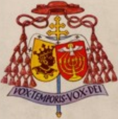 WappenKardinalFaulhaber